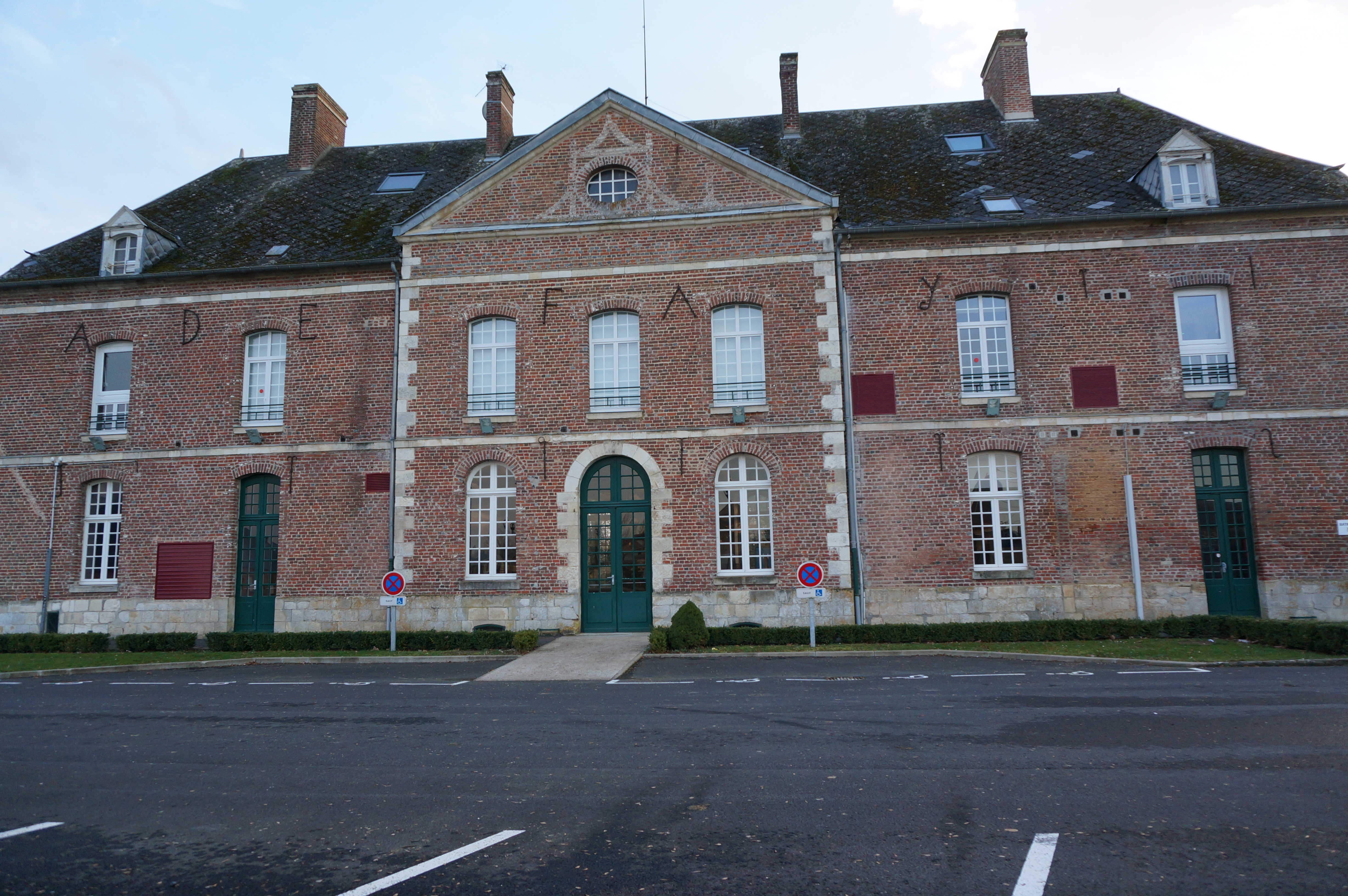 vue depuis La Neuville-Bosmont.